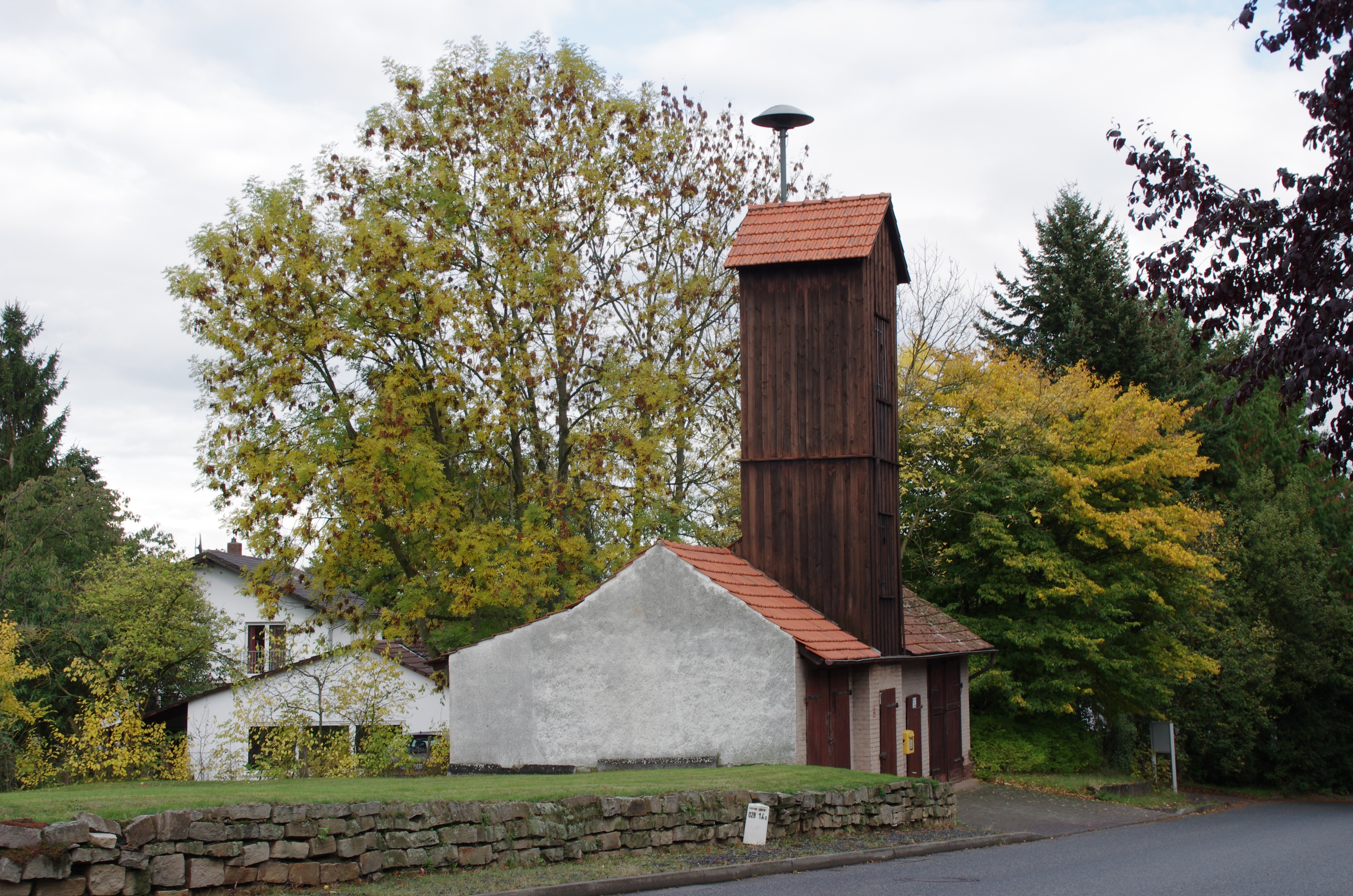 Bad Wildungen, Ortsteil Odershausen in Hessen. Die Feuerwehr befand sich an der Hauptstraße in der Nähe der Kirche.